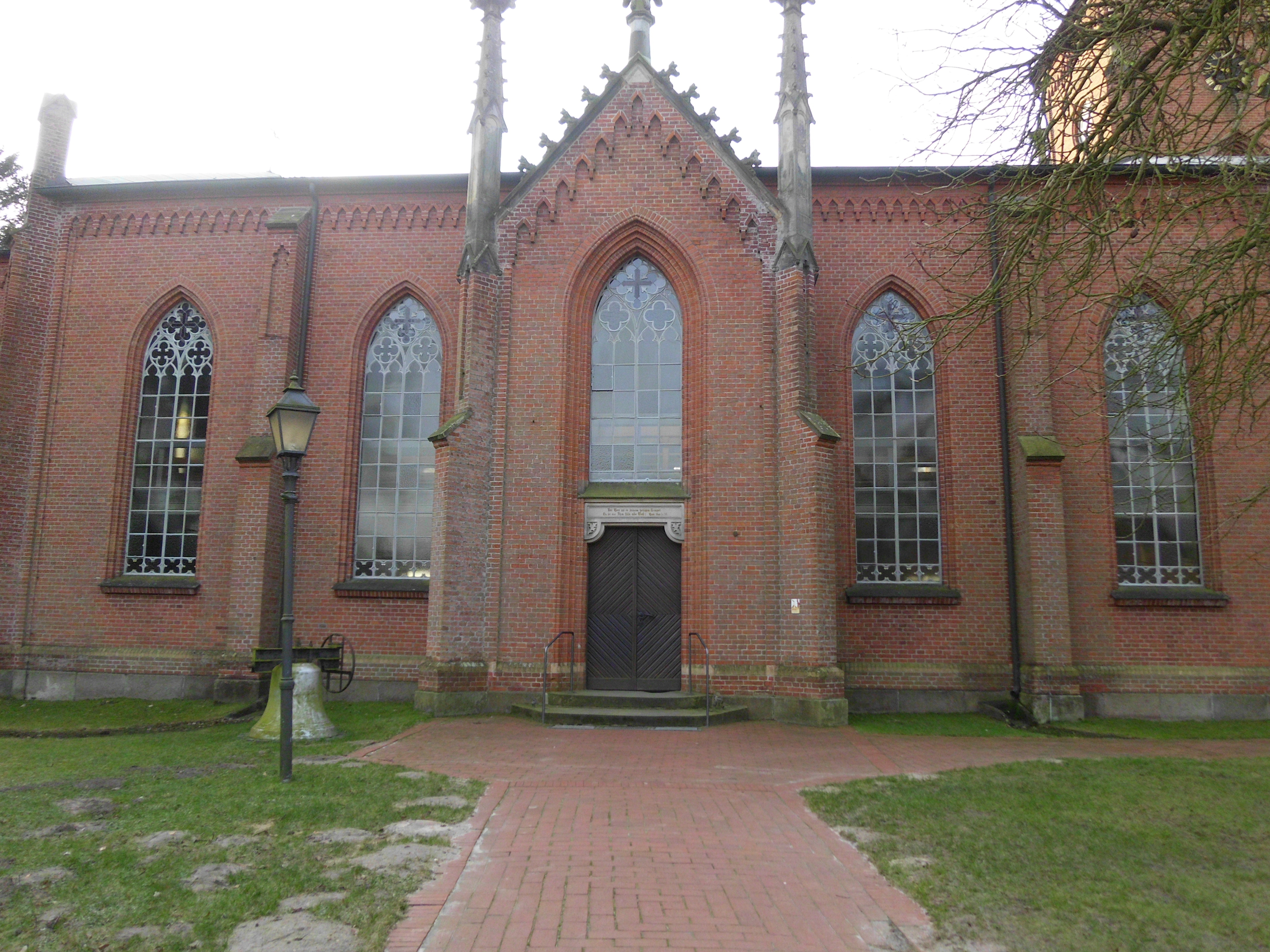 vom Knotenpunkt aus